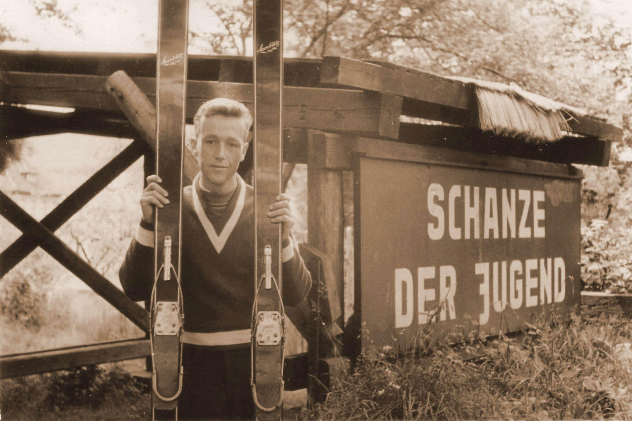 German ski jumper Peter Lesser in the year 1961